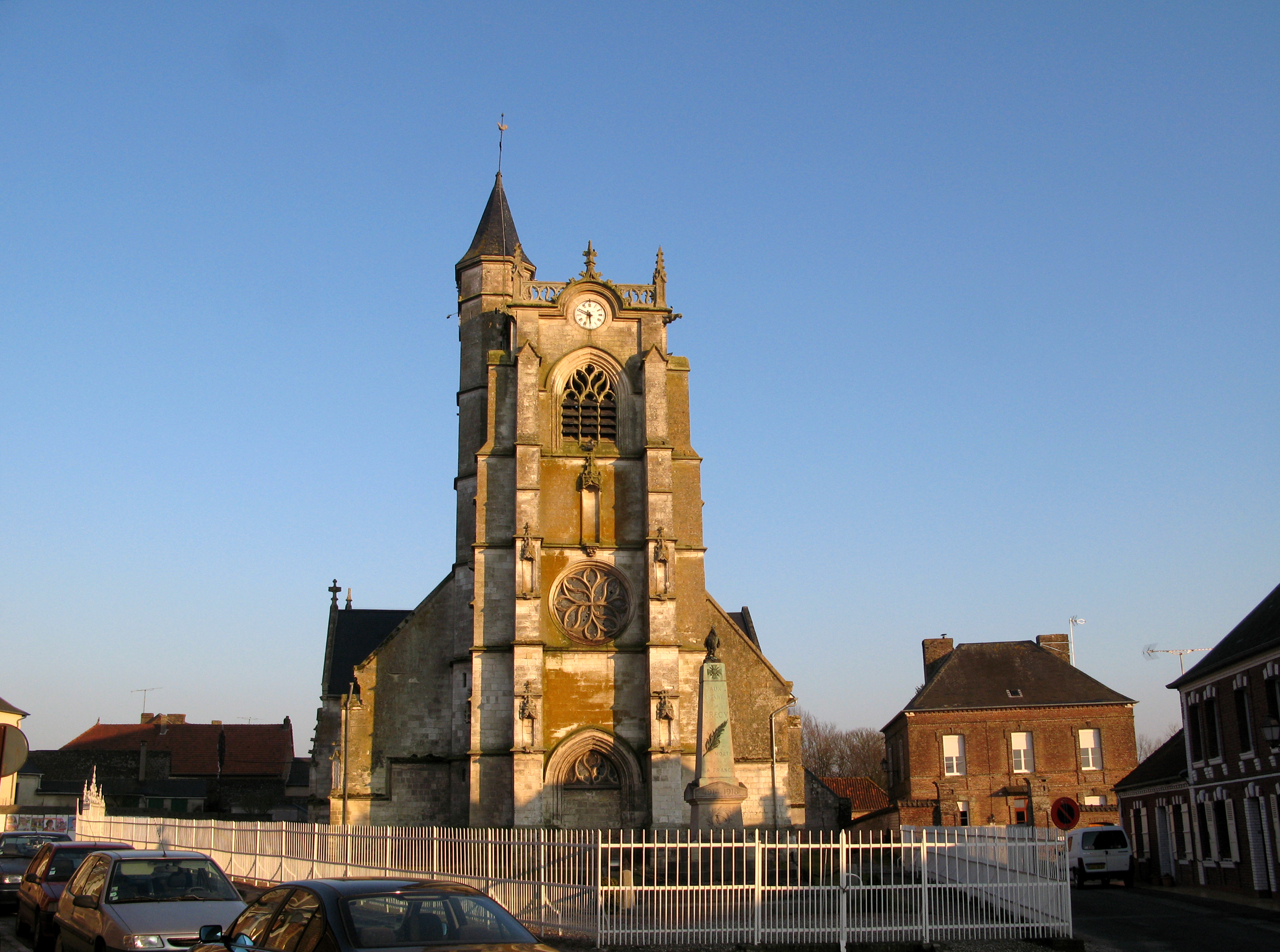 Crécy-en-Ponthieu (Somme, France) - L'église et le monument-aux-morts. .